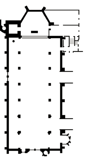 Grundriss der Kirche. Erstellt aus einer Fotografie des alten Schaltplans der Beleuchtung der Kirche.